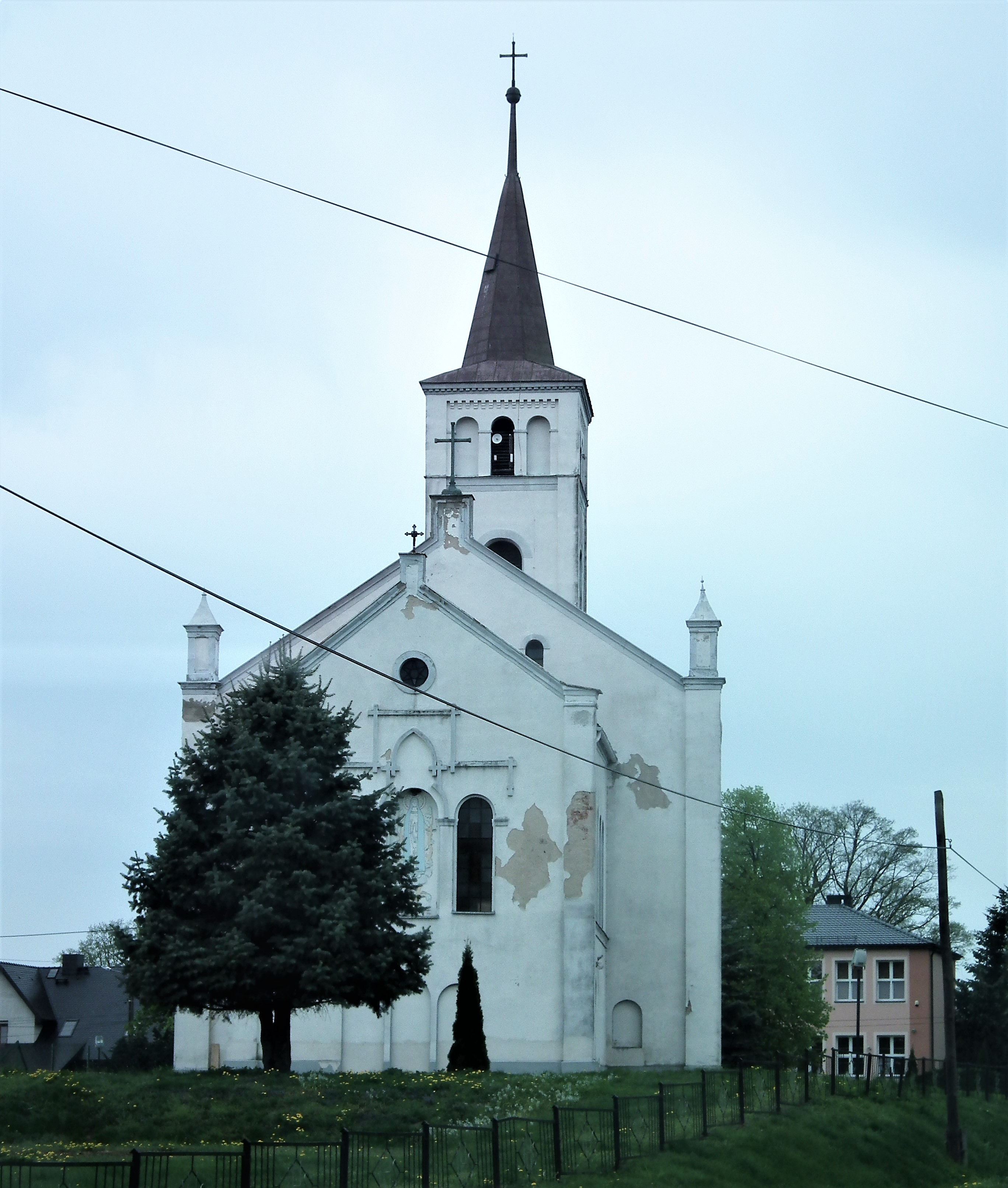 Kościół św. Antoniego w Roszkowicach.